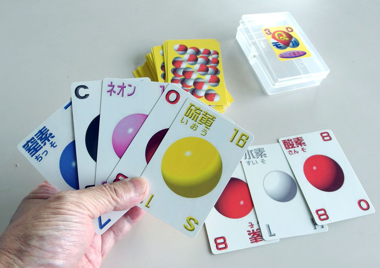 モルQの新版。3DモルQのカード。原子のカードを組み合わせて分子を作る遊び。